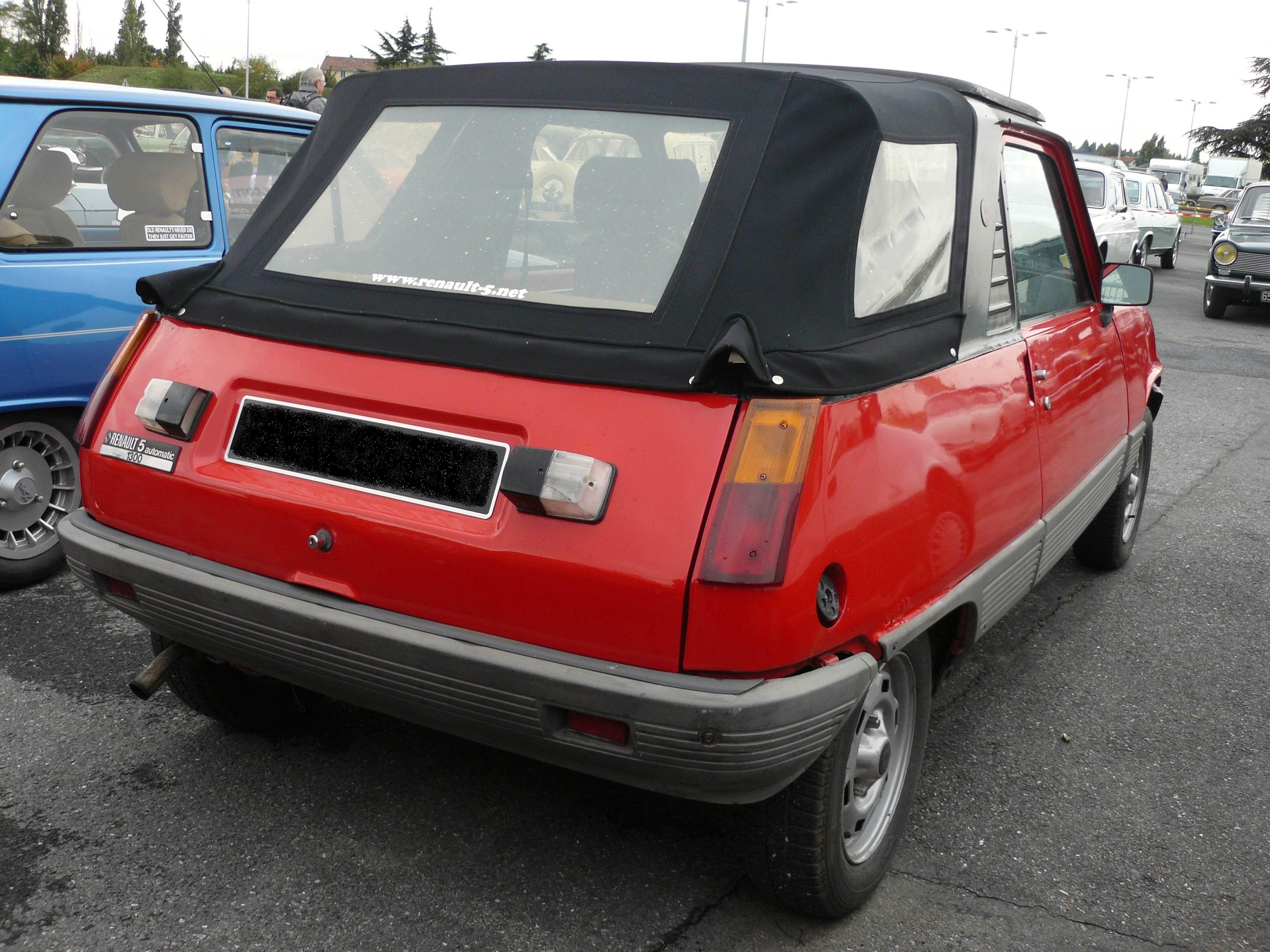 Automedon 2012